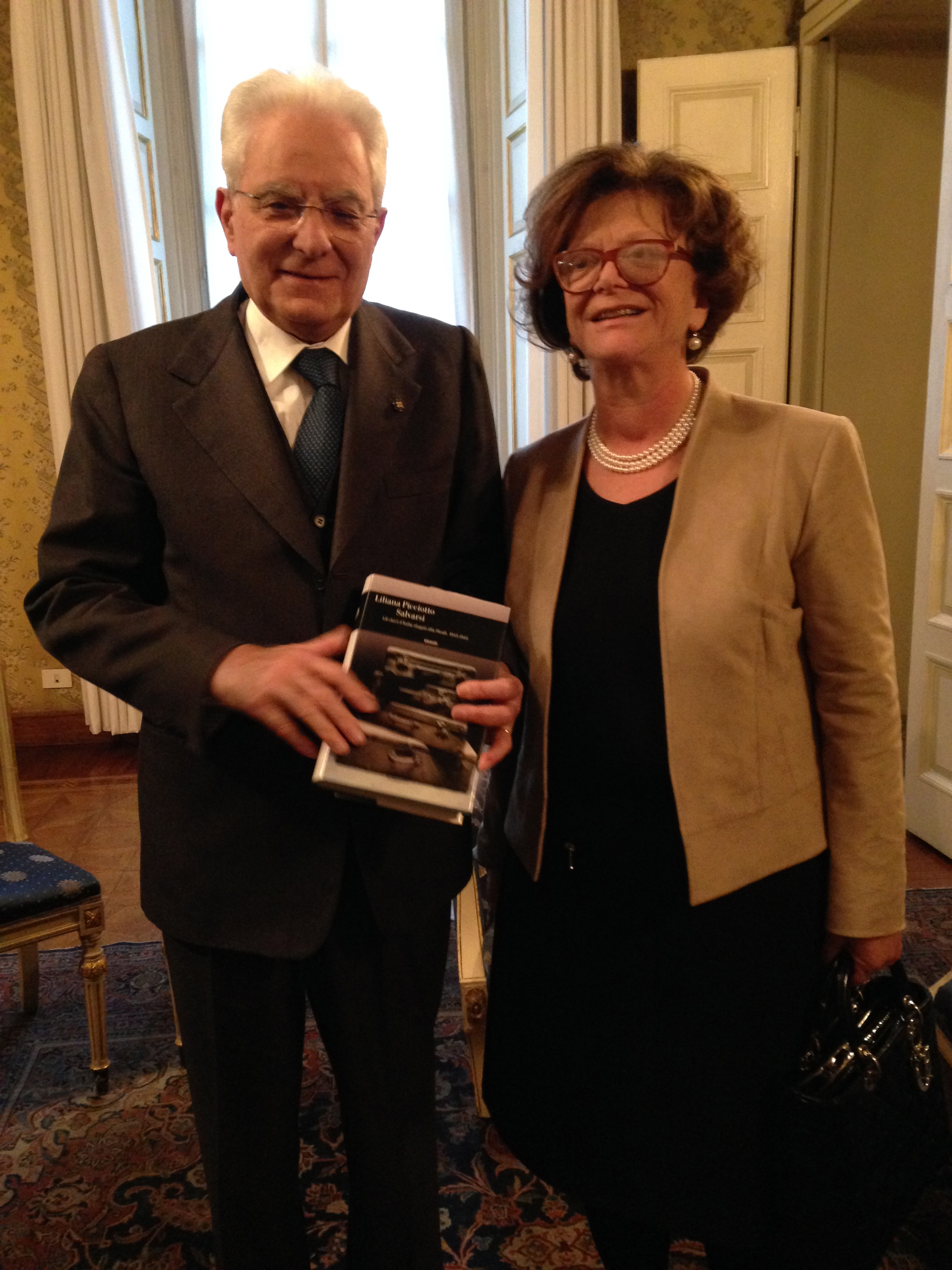 14 novembre 2017, una delegazione del CDEC (Fondazione centro di documentazione ebraica contemporanea ) è ricevuta dal Presidente della Repubblica Italiana Sergio Mattarella. Nell'occasione la storica Liliana Picciotto dona al Presidente il libro di cui è autrice: "Salvarsi. Gli ebrei d'Italia sfuggiti alla Shoah. 1943-1945", di Einaudi, edito nel 2017.